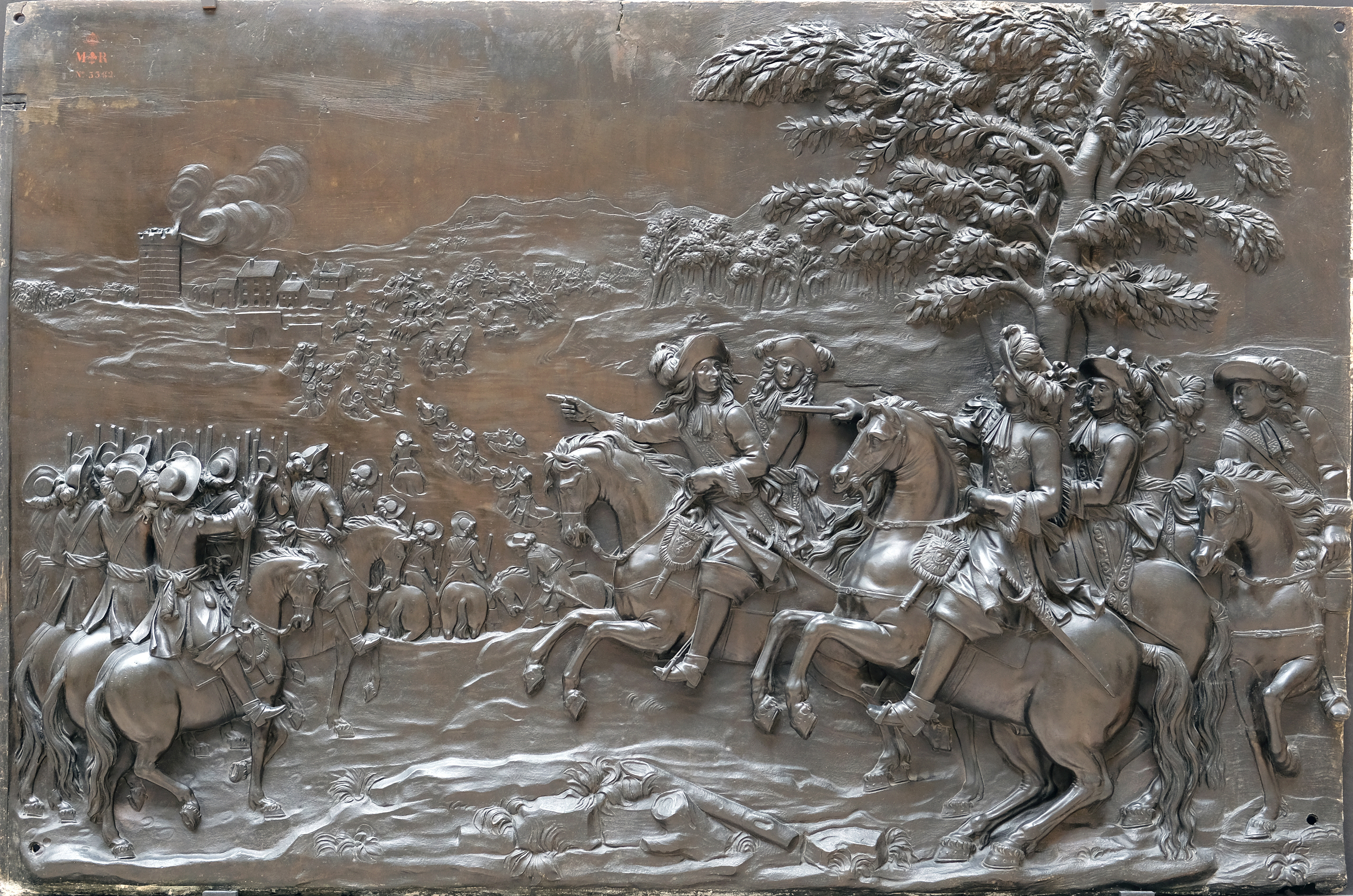 Bas-relief en bronze provenant du piédestal de la statue en bronze de Louis XIV, place des Victoires (Paris). Traversée du fleuve à gué par l'armée française le 12 juin 1672, pour contourner les forces du prince d'Orange et envahir la Hollande. On remarque le roi et Condé dans le groupe de cavaliers..